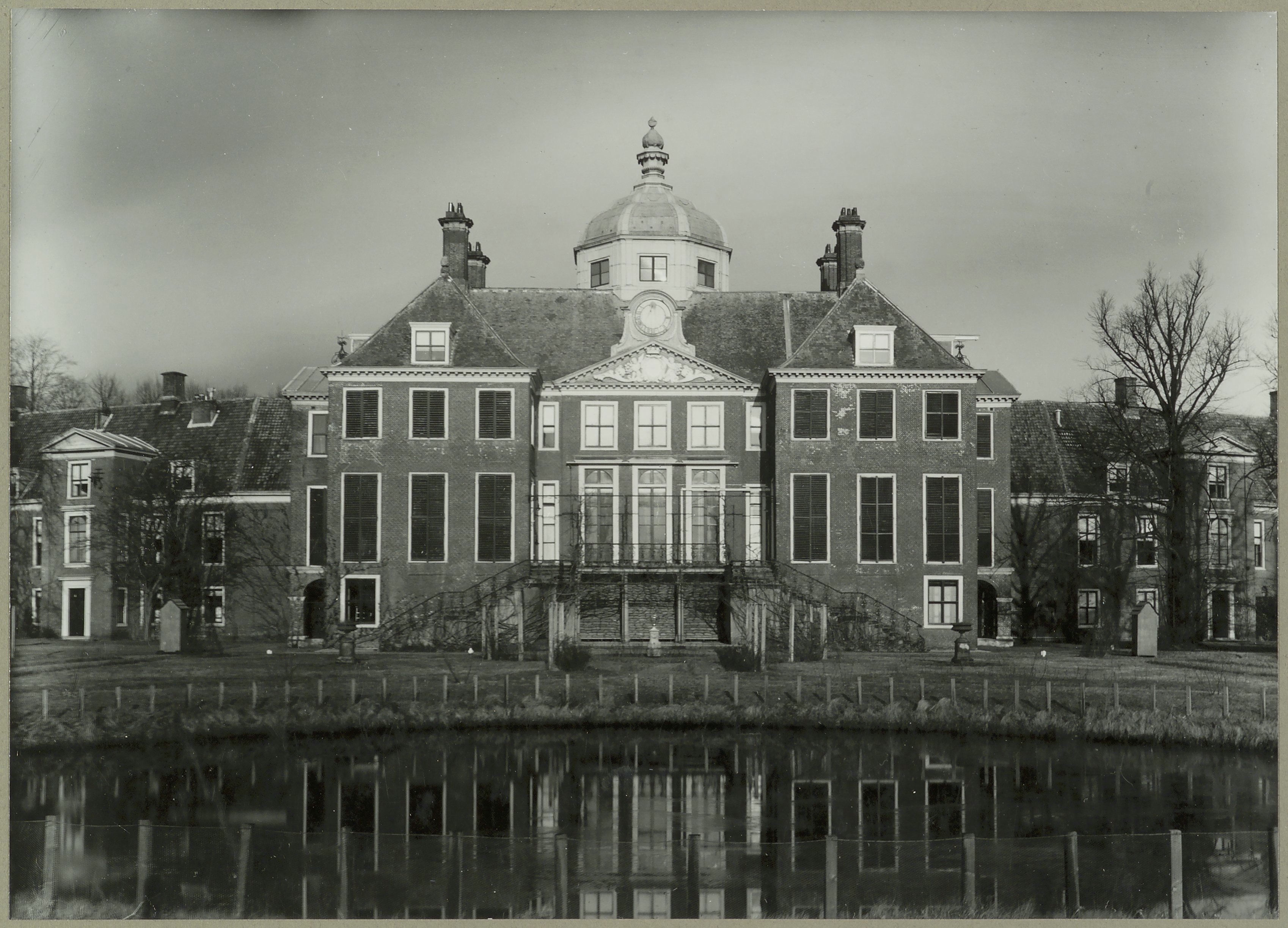 Huis ten Bosch: Achtergevel aan water gezien vanuit het zuiden